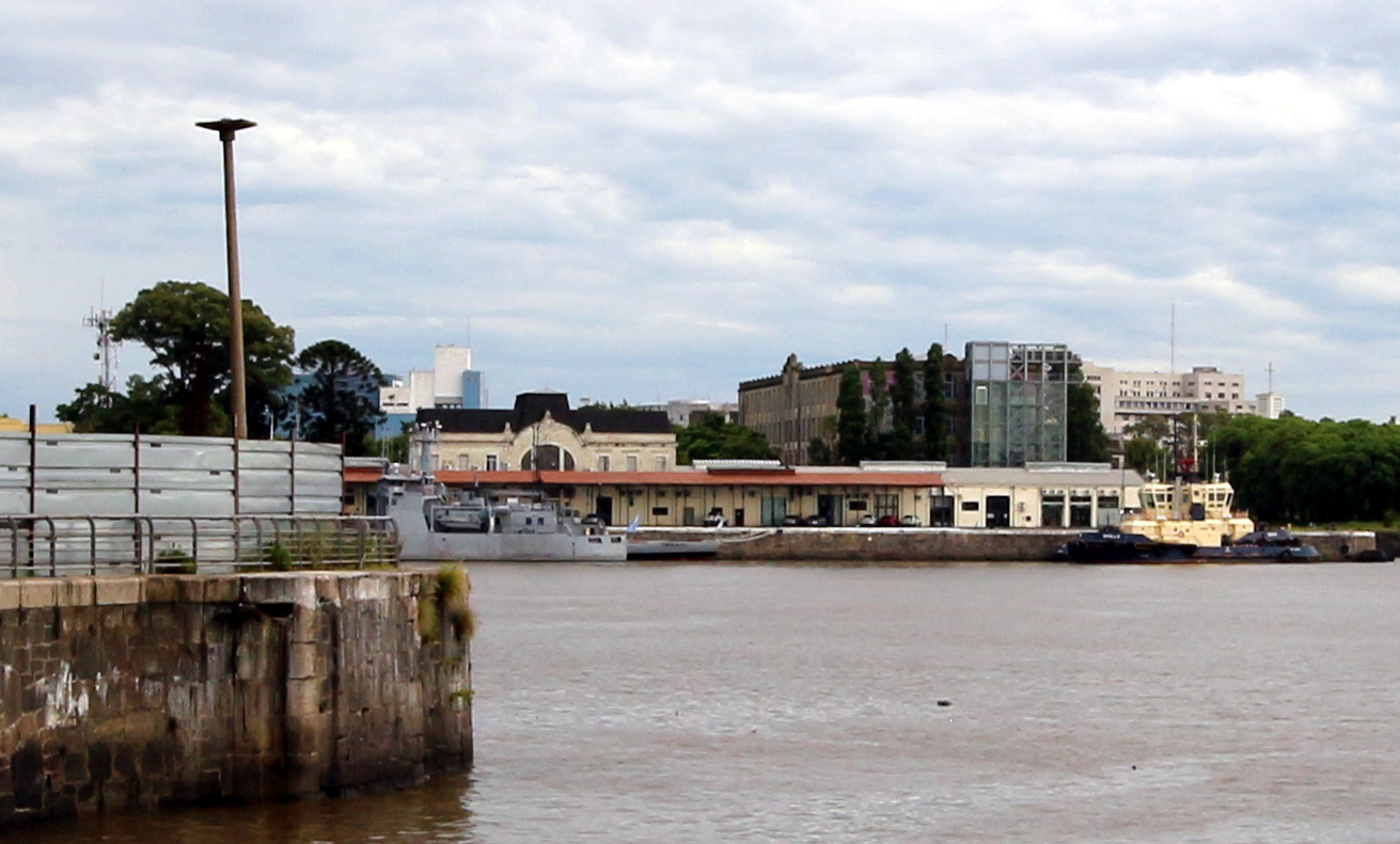 Museo de la Inmigración in Buenos Aires, Argentinien.